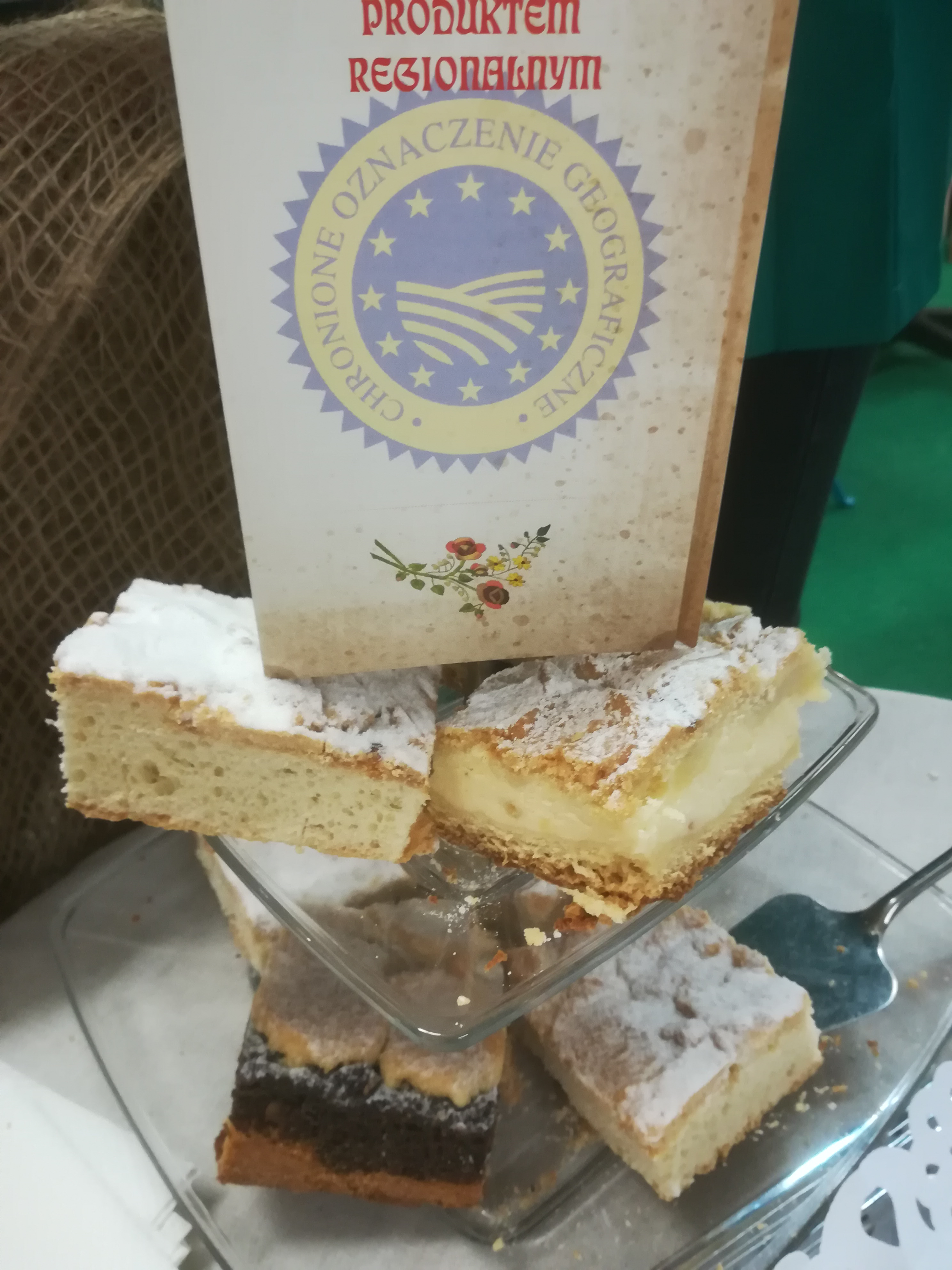 Narodowa Wystawa Rolnicza w Poznaniu na MTP z okazji 100-lecia odzyskania niepodległości.